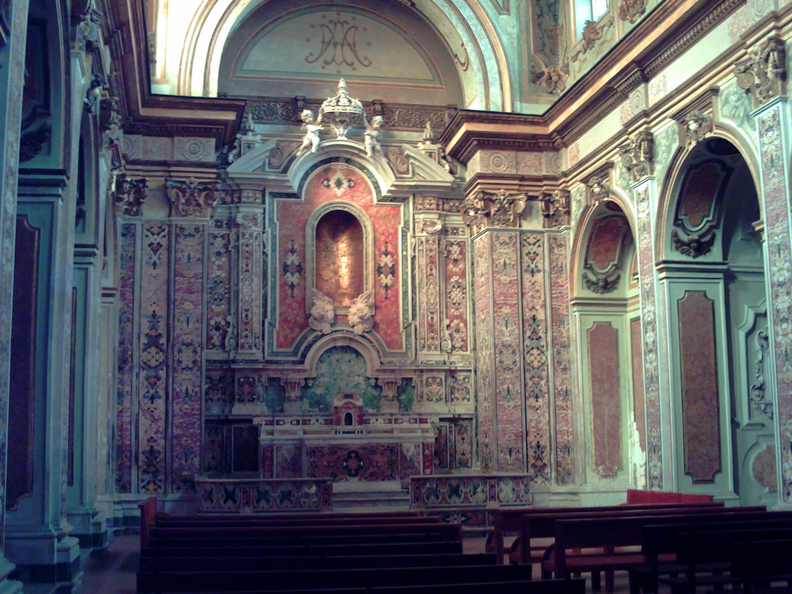 Interno Croce di Lucca